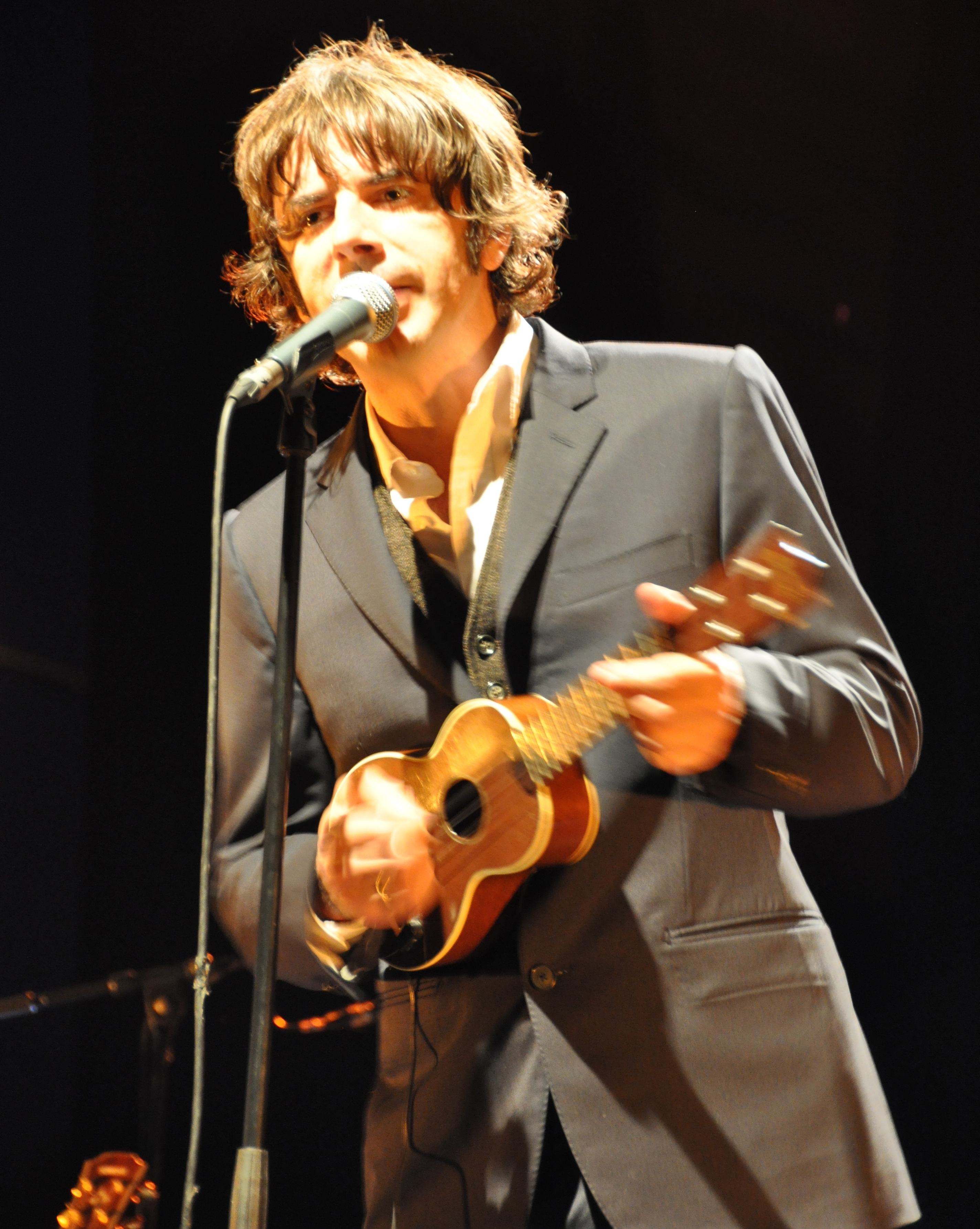 Thomas Fersen à Marseillette (Aude).